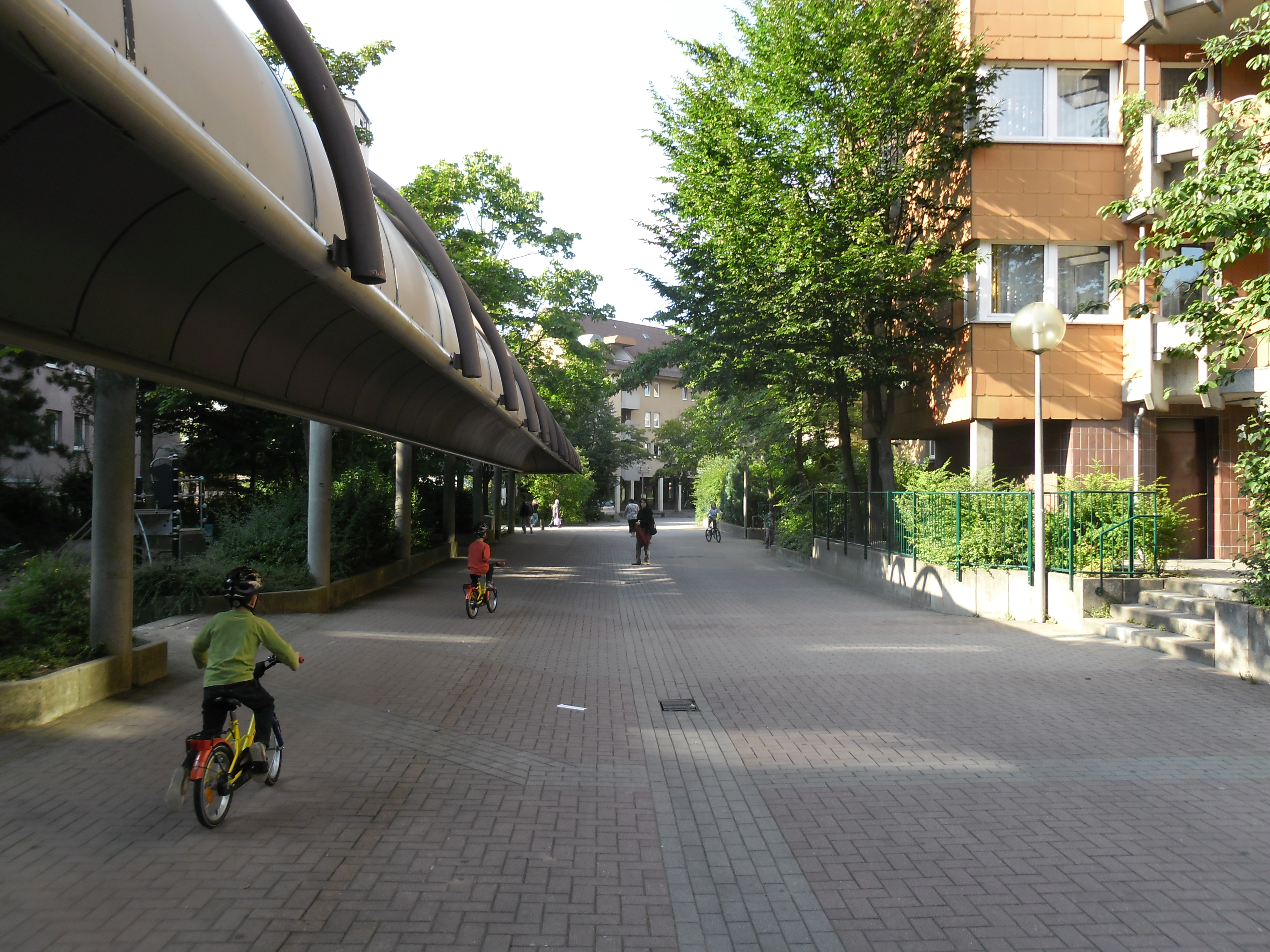 Blick in nördliche Richtung entlang des Carossaweges